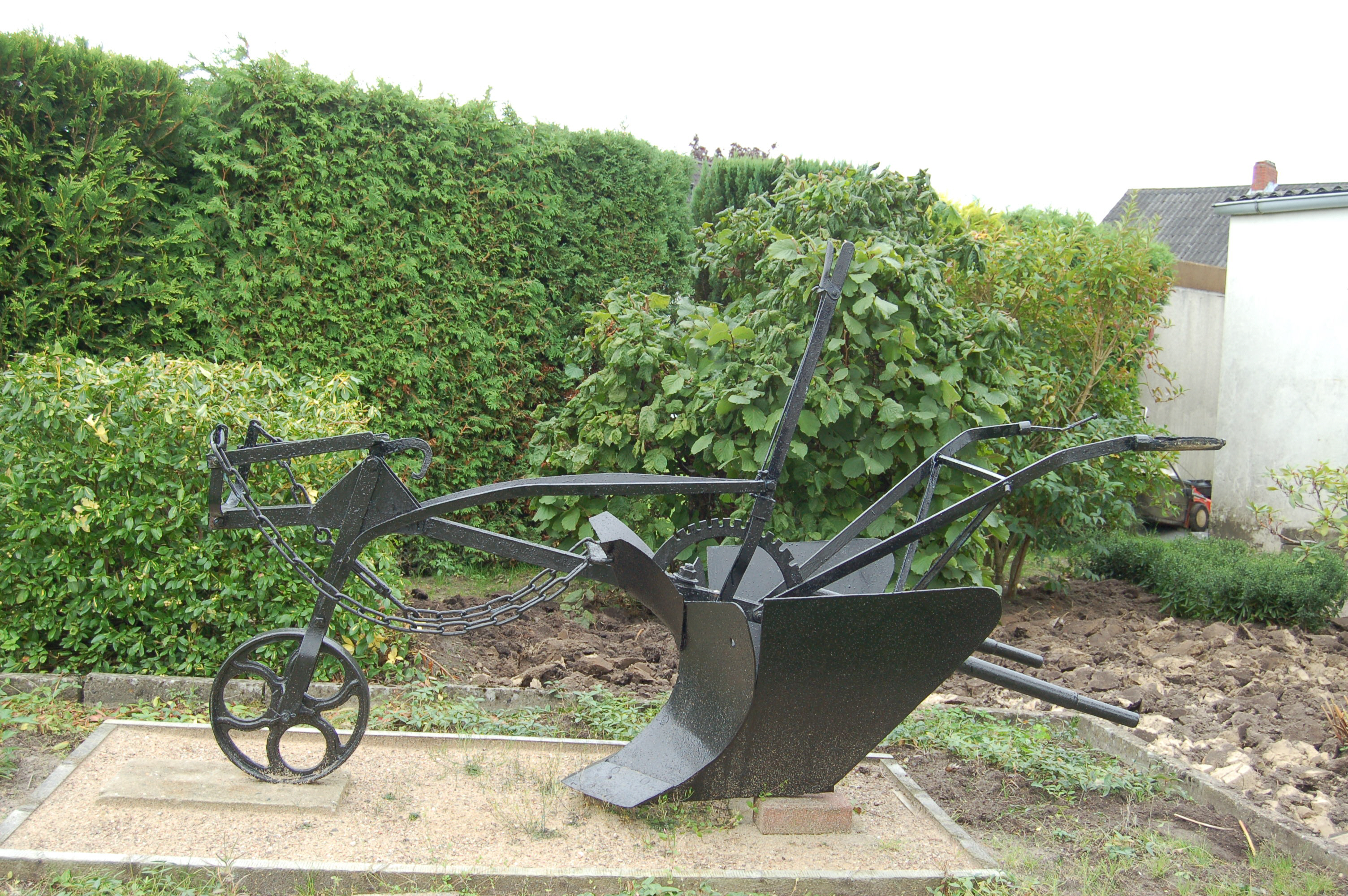 Historischer Moorpflug im Außenbereich des Hobby-Heimat-Museum Hetlingen